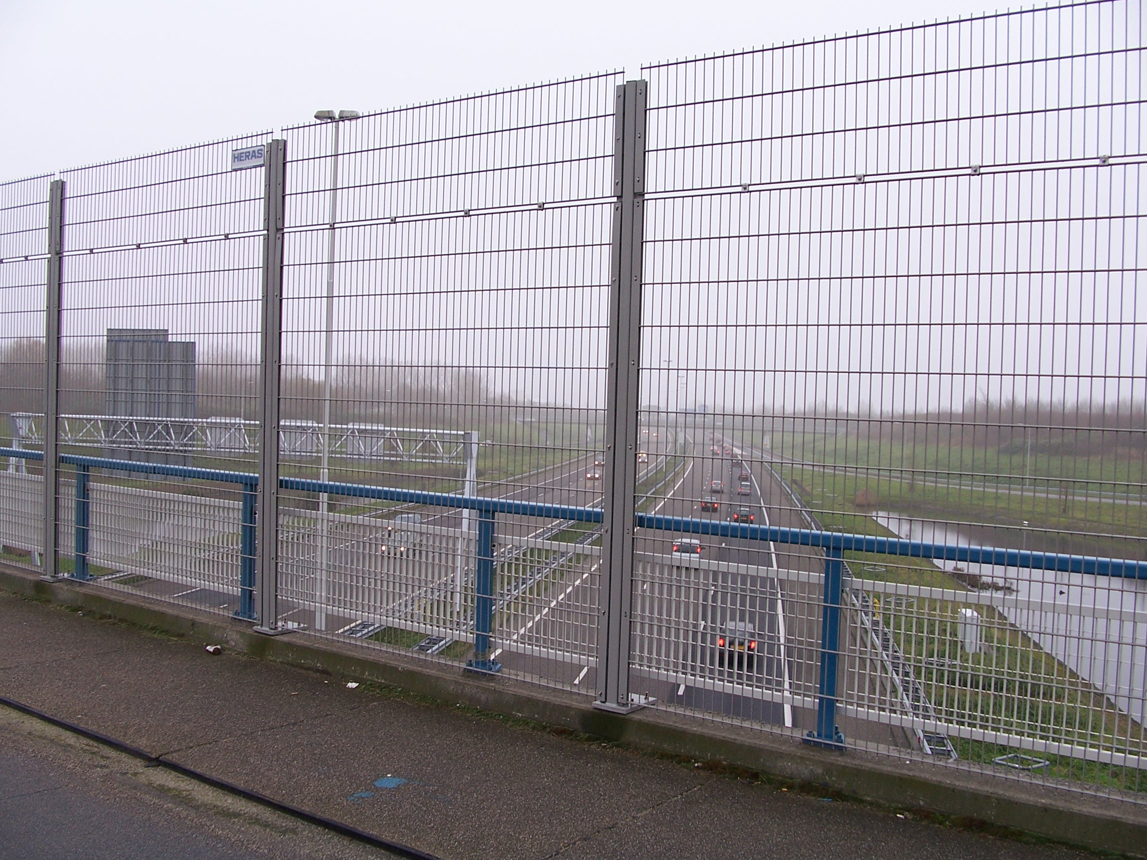 A bridge over the A4 (Rijswijk; The Netherlands)